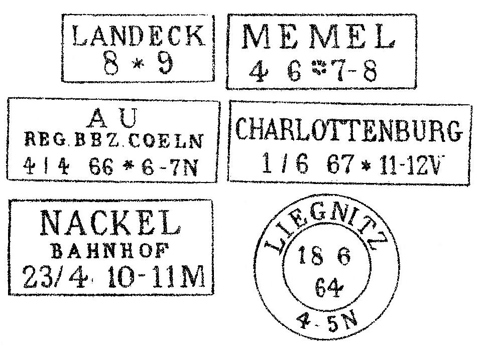 Eine Auswahl preußischer Rahmenstempel